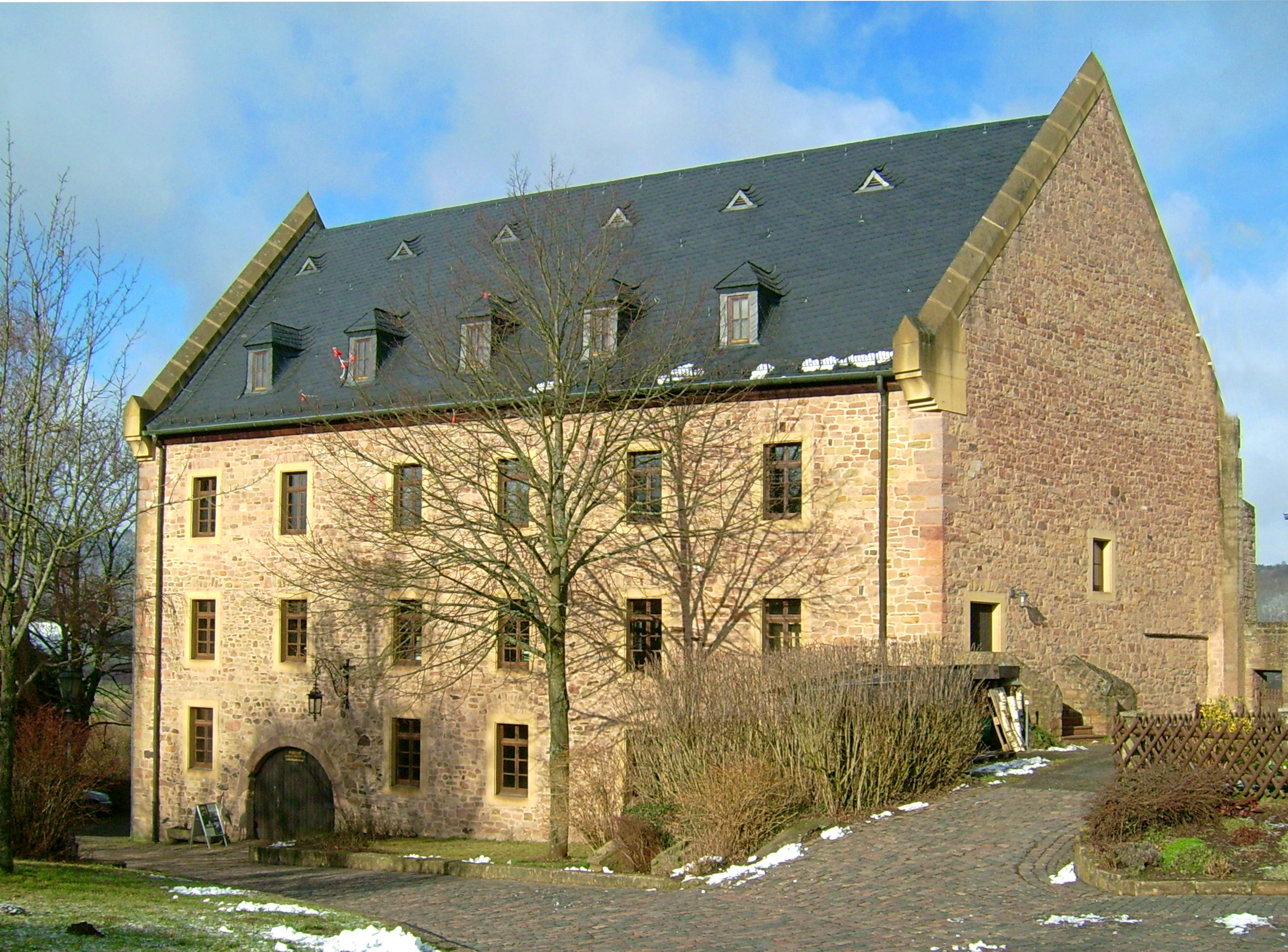 Zehntscheune in der Burg Lichtenberg